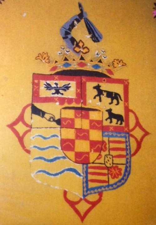 Foto tomada en la finca 'El Vaqueril' de Brozas (Cáceres), propiedad de los descendientes de Fernando Ruano y Prieto. Detalle de Repostero. Descripción: Cuartelado (1º) Ruano, (2º) Prieto, (3º) Vargas-Machuca y (4º) Muñoz-Cobo. En escusón Velasco. Coronas de Marqués y Barón. Cimera: Vargas-Machuca. Cruz del Real Cuerpo de la Nobleza de Madrid.